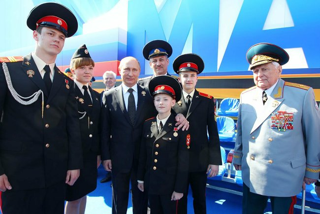 По окончании военного парада в ознаменование 68-й годовщины Победы в Великой Отечественной войне.